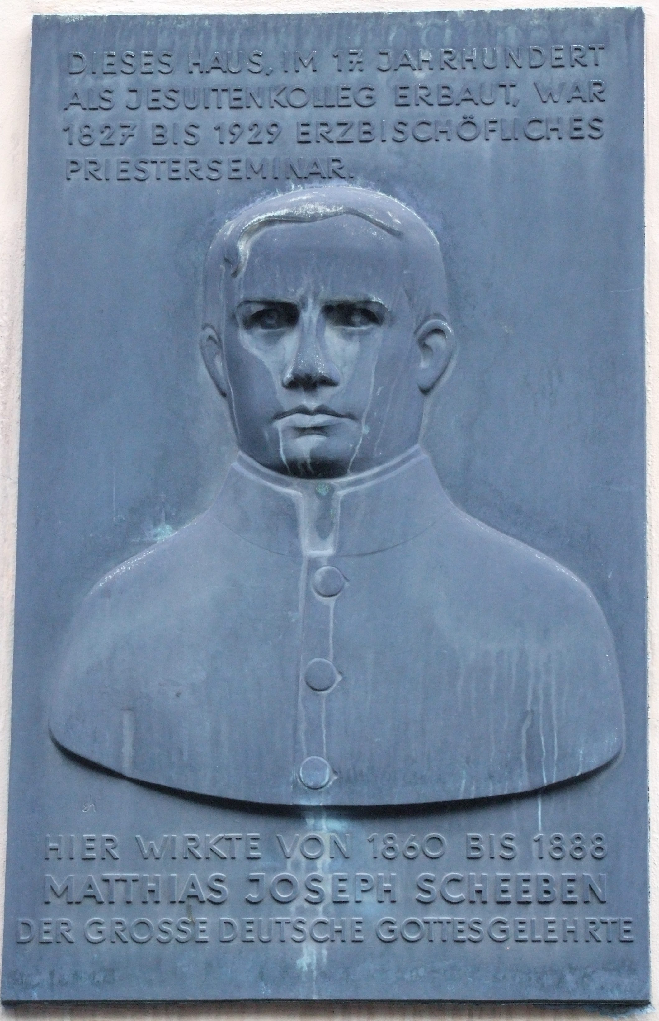 Gedenktafel für Matthias Joseph Scheeben am Haus des erzbischöflichen Generalvikariats Marzellenstr. 32 in Köln.